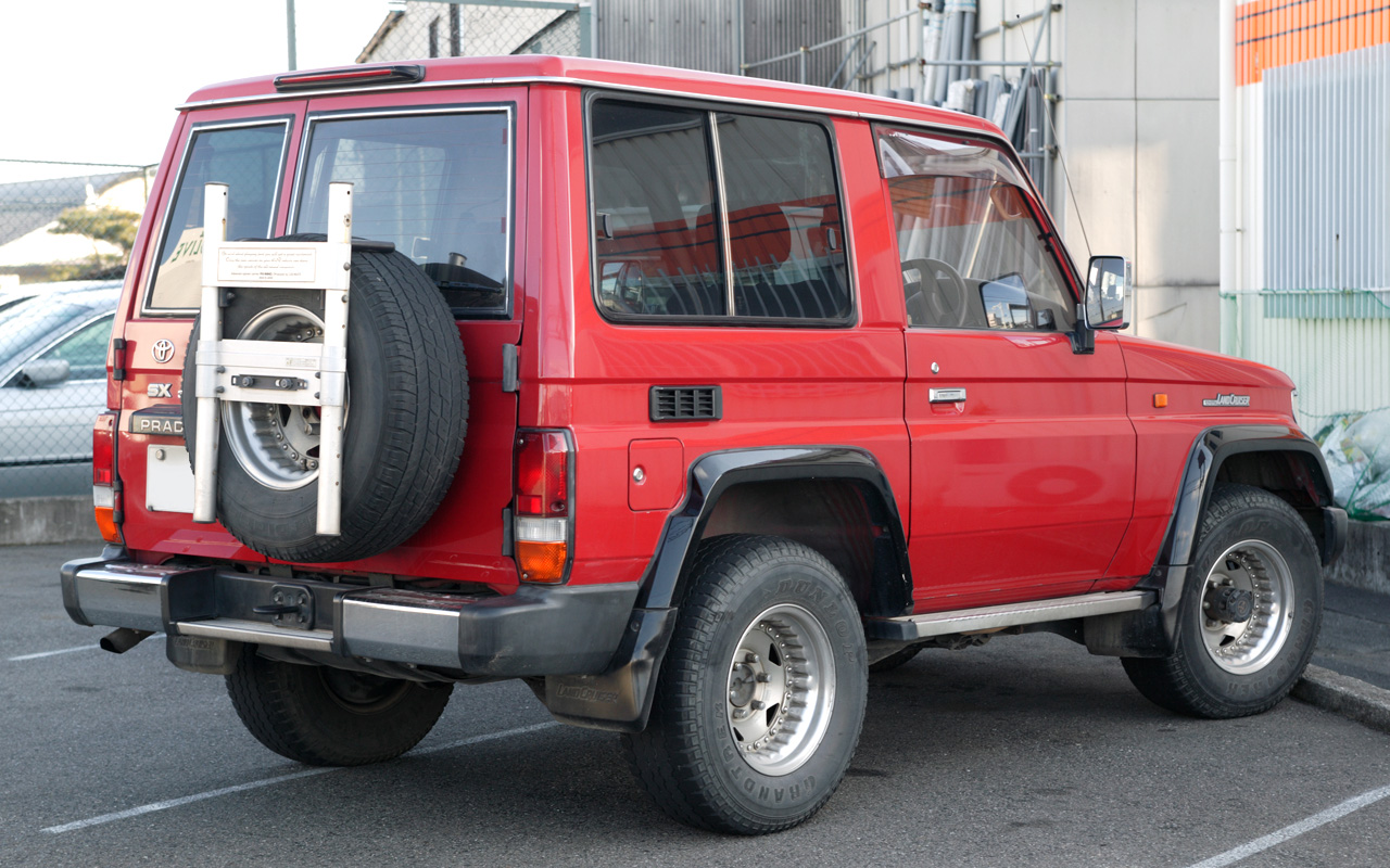 Toyota Land Cruiser 70 Prado 2 Door Hardtop 3.0DT SX Wide (KZJ71W)